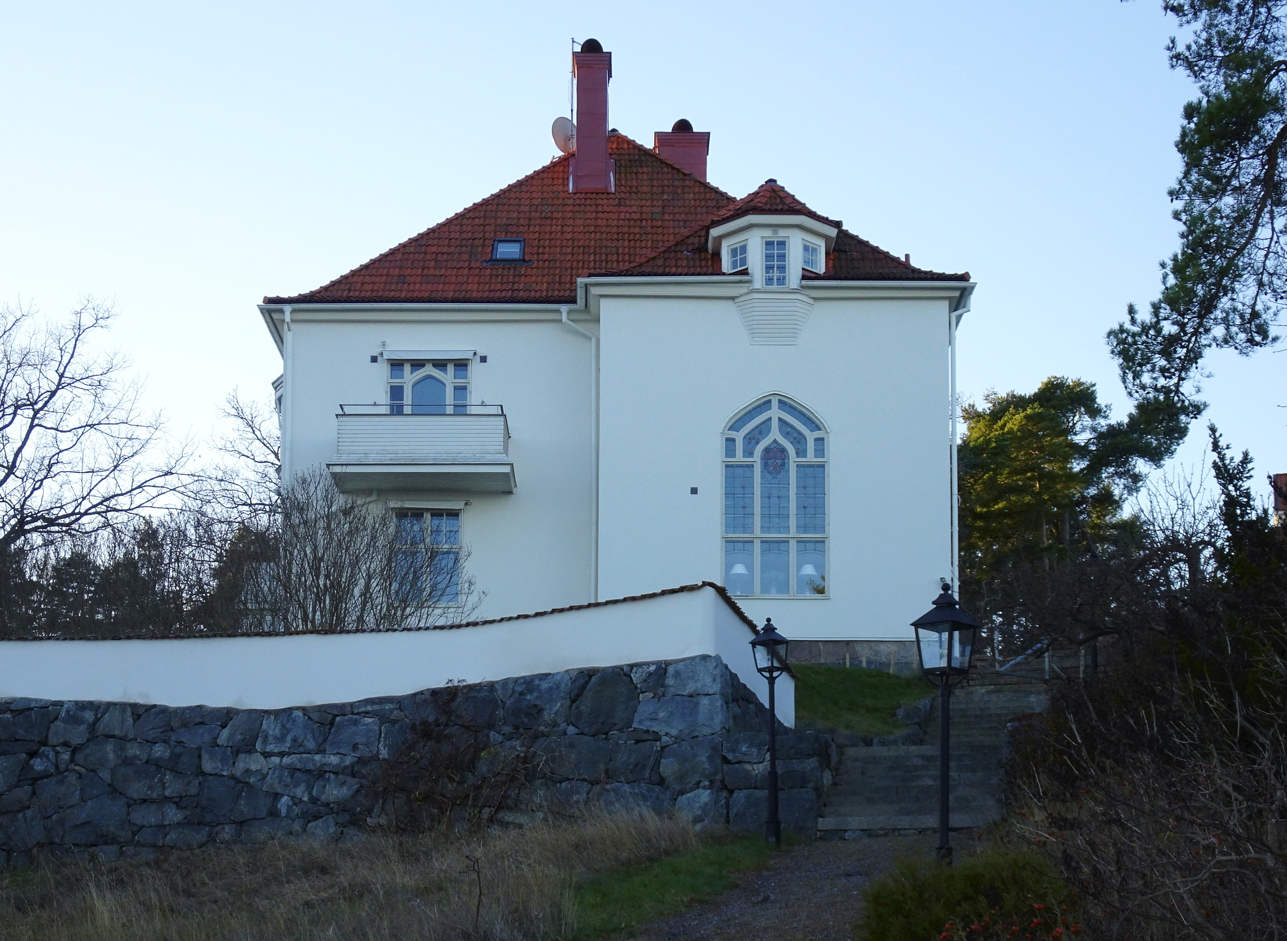 Villa Viksborg (Kinnanderska villan), Saltsjöpomenaden 32, arkitekt Carl Westman